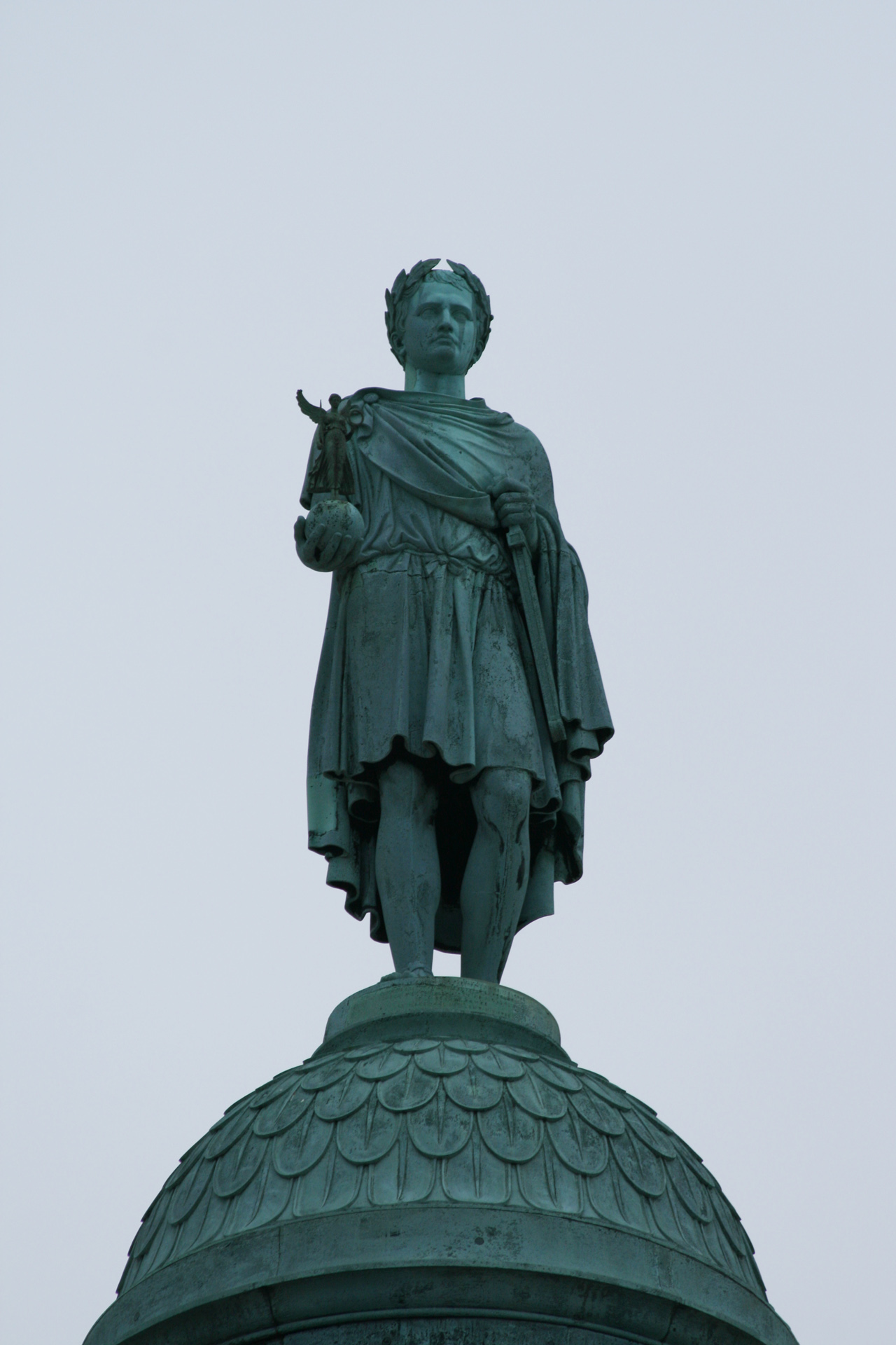 Statue Napoléon Ier, place Vendôme, Réplik des Werkes von Chaudet durch Auguste Dumont, (Paris) 1875